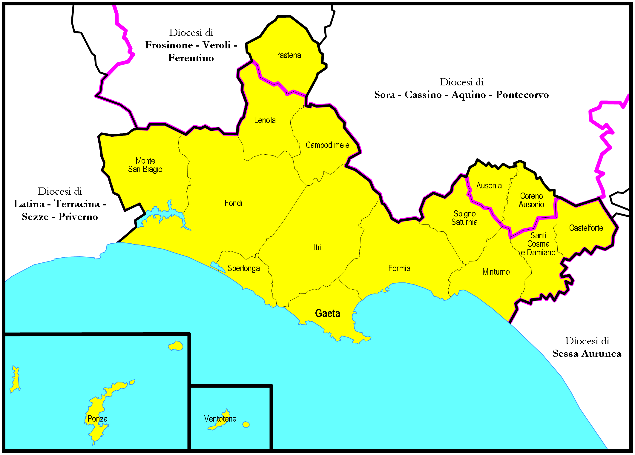 Mappa della Diocesi di Gaeta